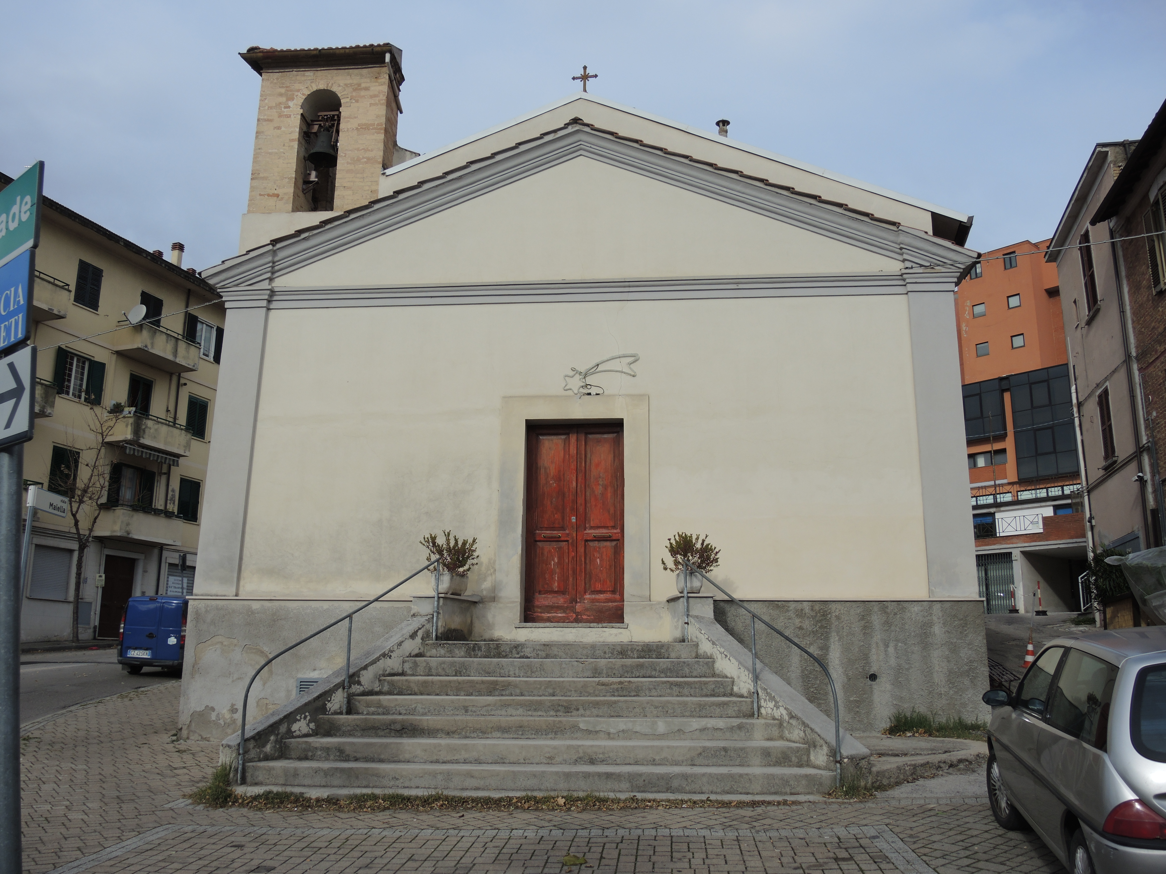 Chieti: Chiesa di Santa Maria Calvona